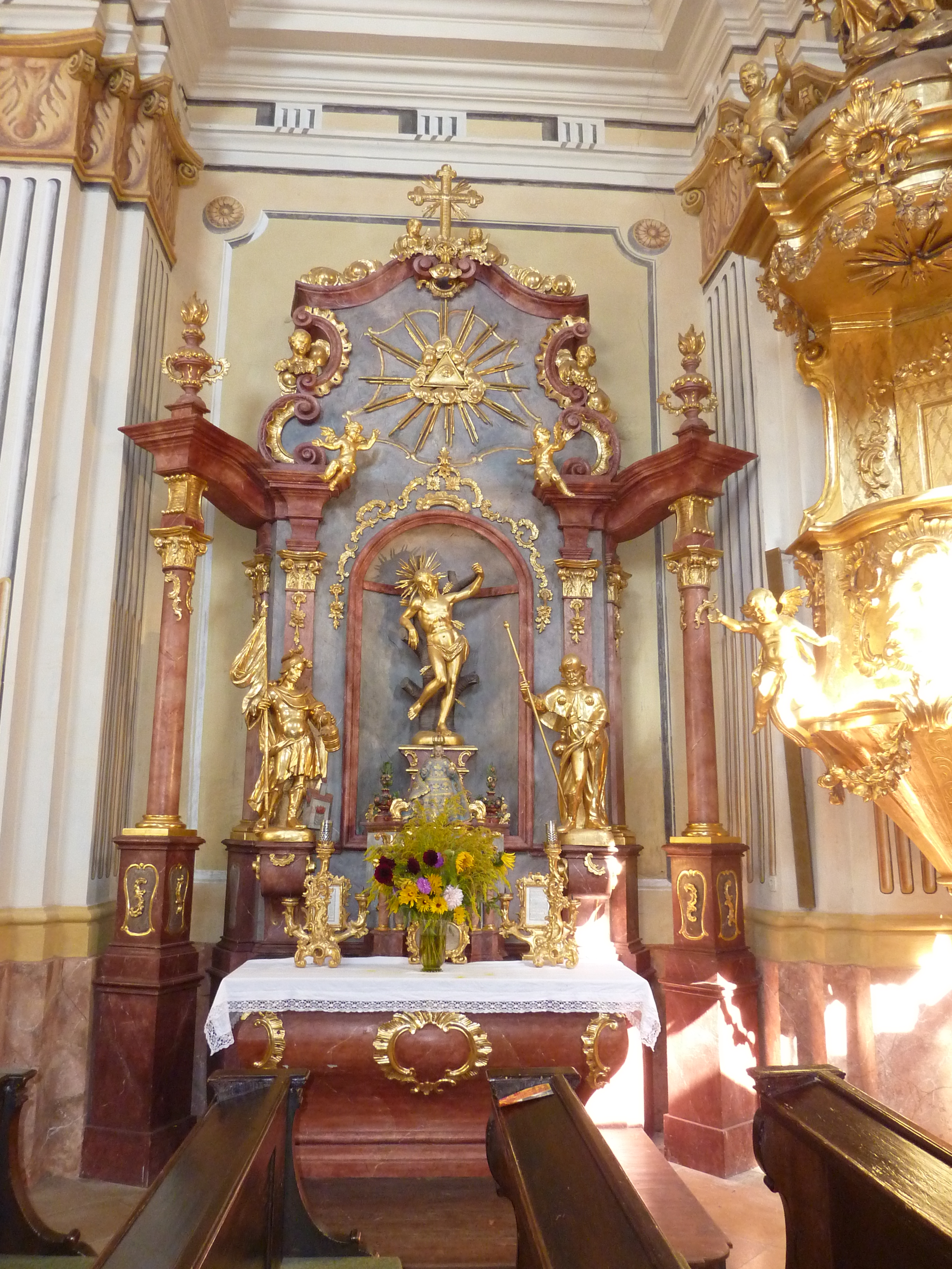 Pfarrkirche, Albrechtsberg an der Großen Krems, Niederösterreich - linker Seitenaltar mit Statue hl. Sebastian, flankiert von Statuen hll. Florian und Rochus, darunter Prager Jesulein